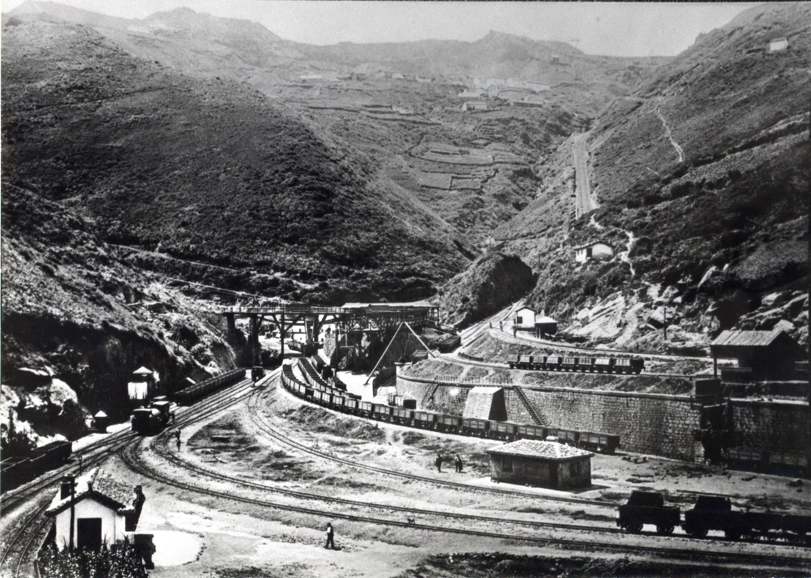 Orconerako trena. Images between 1890-1910